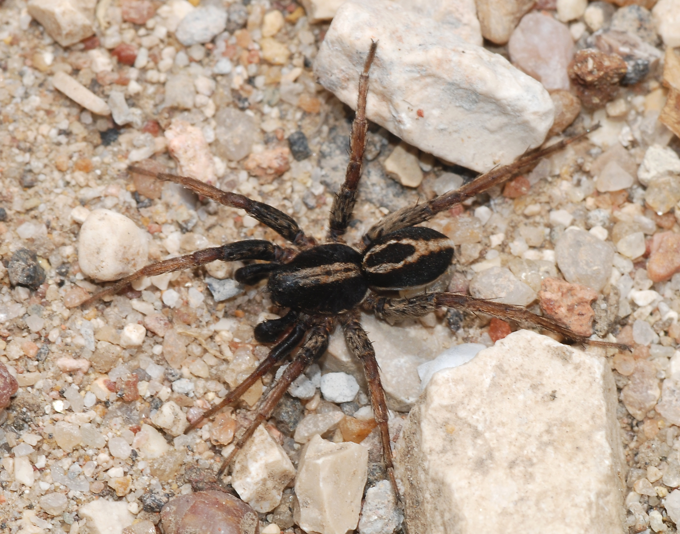 A male Alopecosa albofasciata